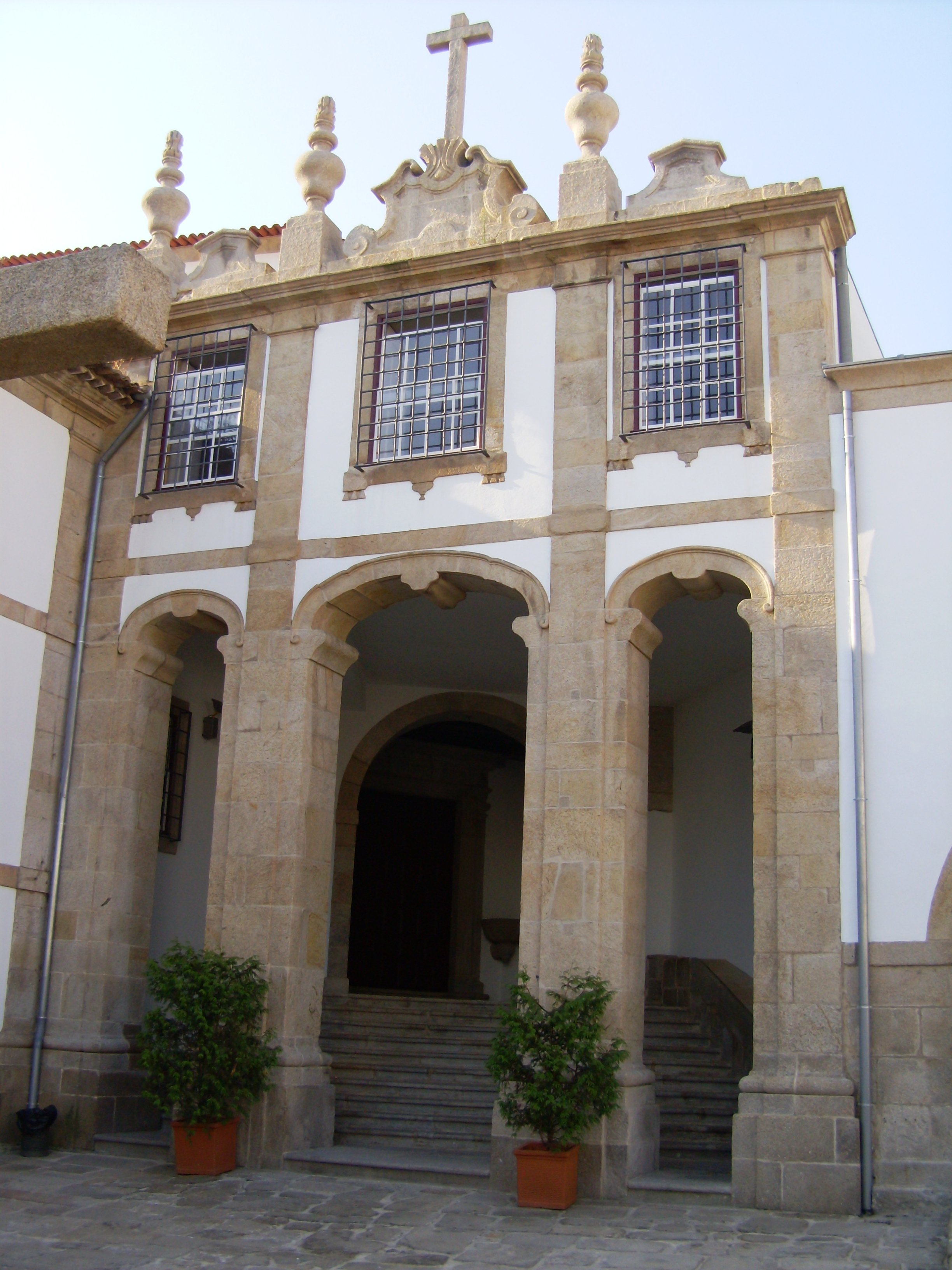 Convento de Corpus Christi, Vila Nova de Gaia, distrito do Porto, Portugal: fachada da Igreja.